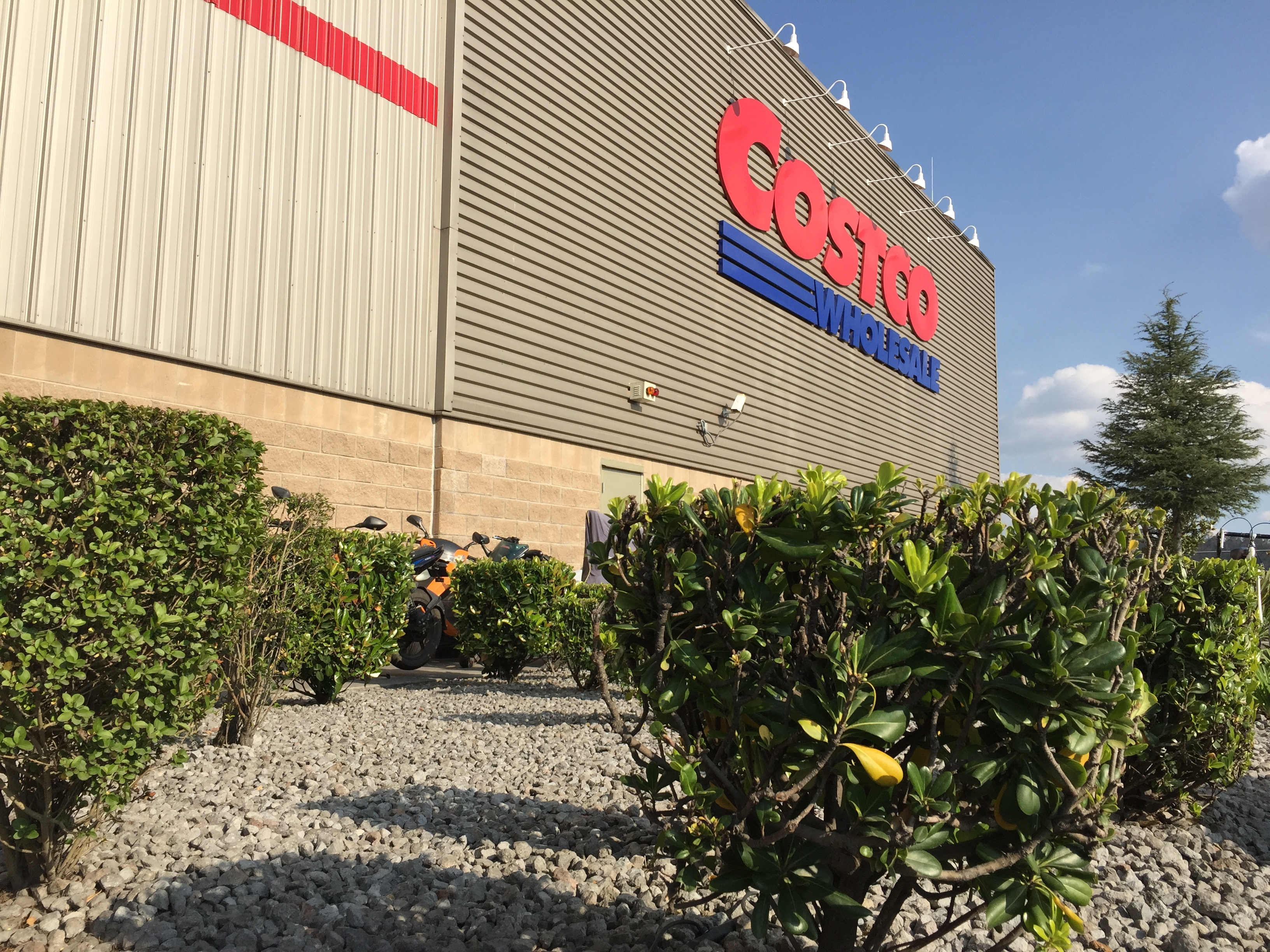 Costo ubicado en Metepec, México.